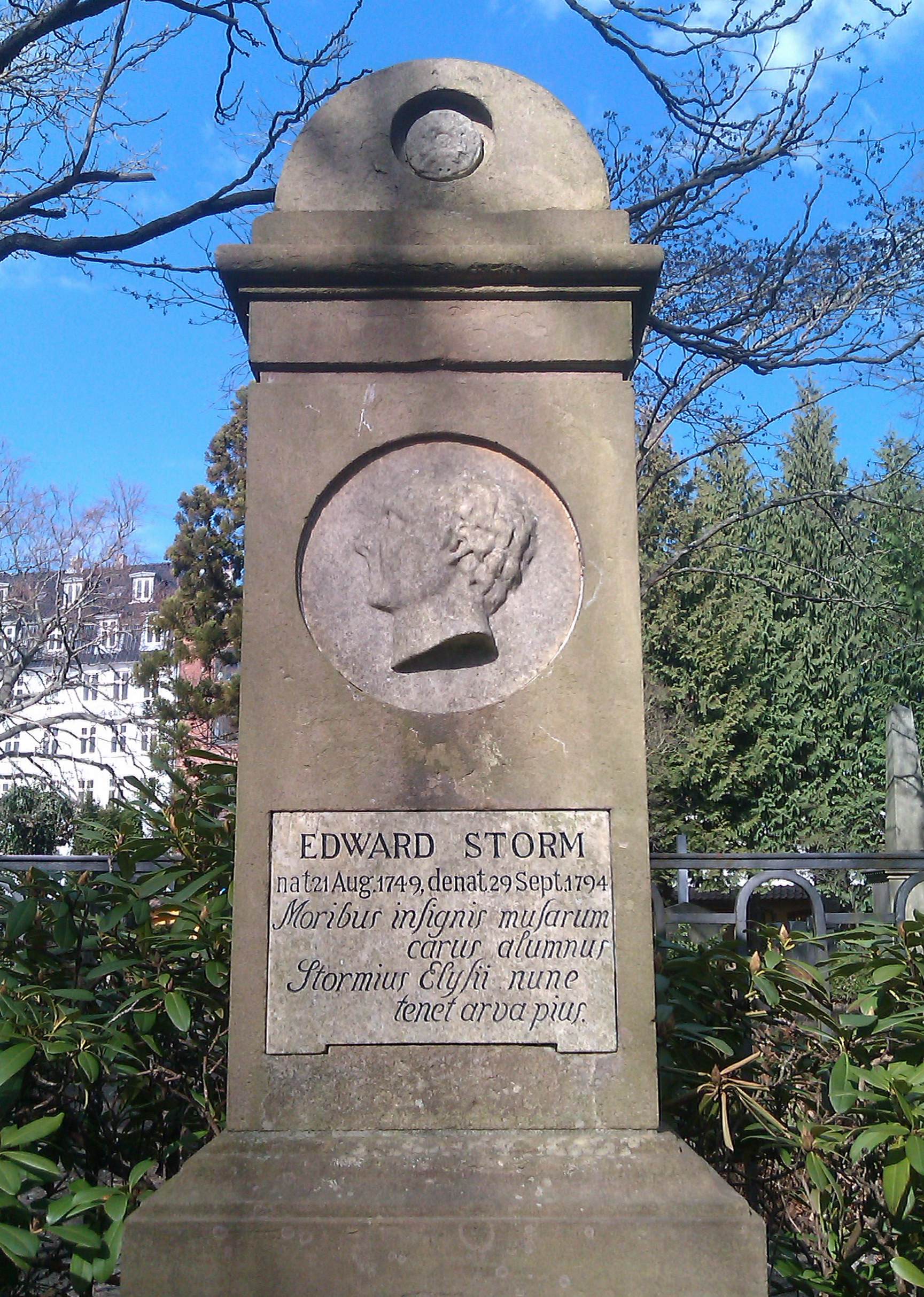 Digteren Edward Storms gravsten på Assistens Kirkegård med portrætmedaljon af P. E. Rasmussen, Nørrebro, København. EDWARD STORM nat 21 Aug. 1749, denat 29 Sept. 1794 Moribus insignius musarum carus alumnus Stormius Elysii nune tenet arva pius.